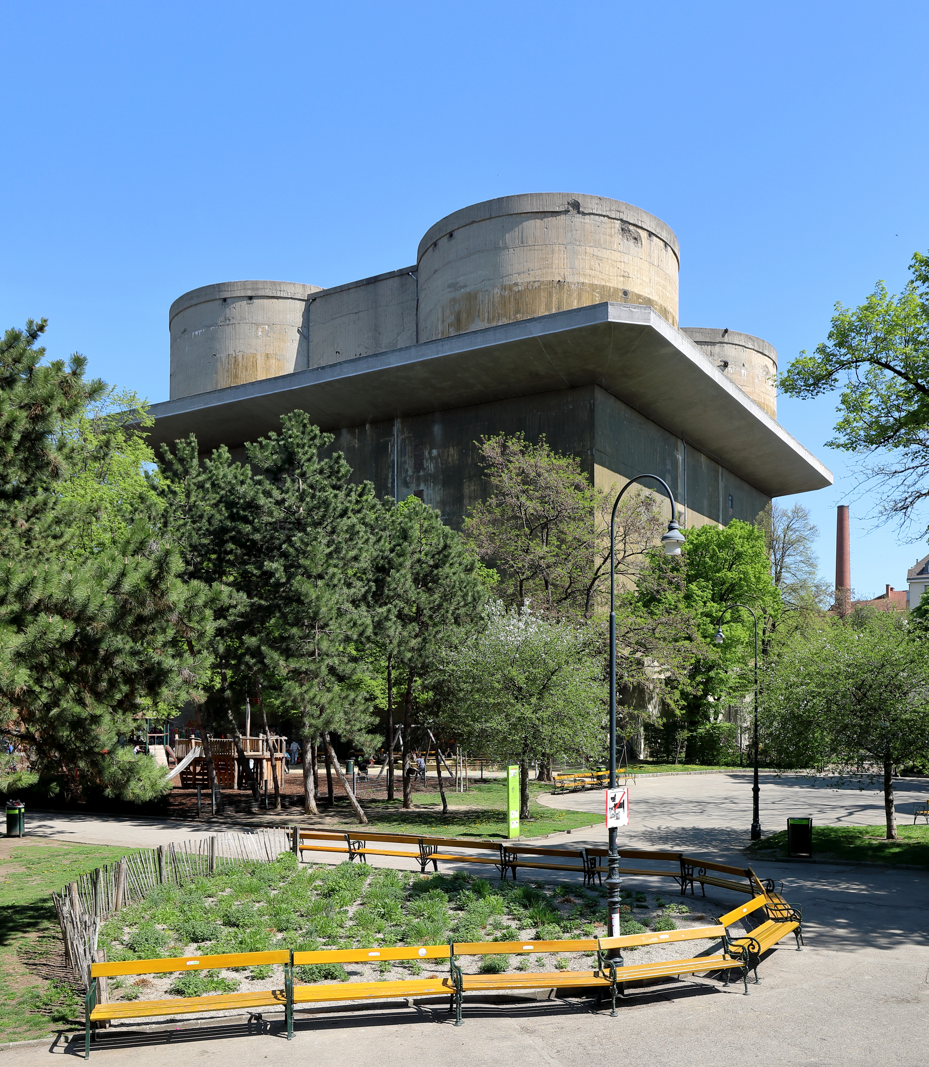 Der Flak-Geschützturm im Arenbergpark des 3. Wiener Gemeindebezirkes Landstraße. Die Wiener Flaktürme wurden von 1942 bis 1944 nach Plänen des Architekten Friedrich Tamms errichtet. Weitere Flakturmpaare (Geschützturm und Leitturm) gibt es in Wien im Augarten und in der Stiftskaserne (Geschützturm) / Esterházypark (Leitturm).